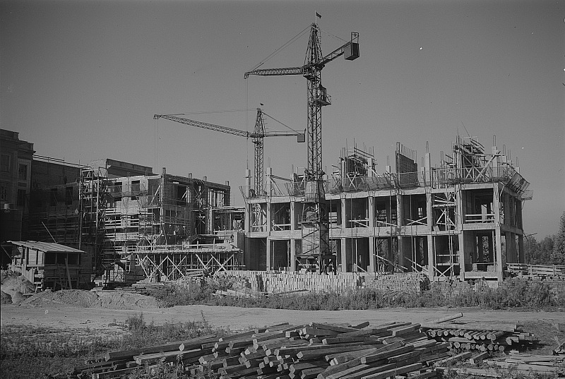 Original image description from the Deutsche Fotothek Dresden. Neubau eines Institutsgebäudes für die Hochschule für Verkehrswesen